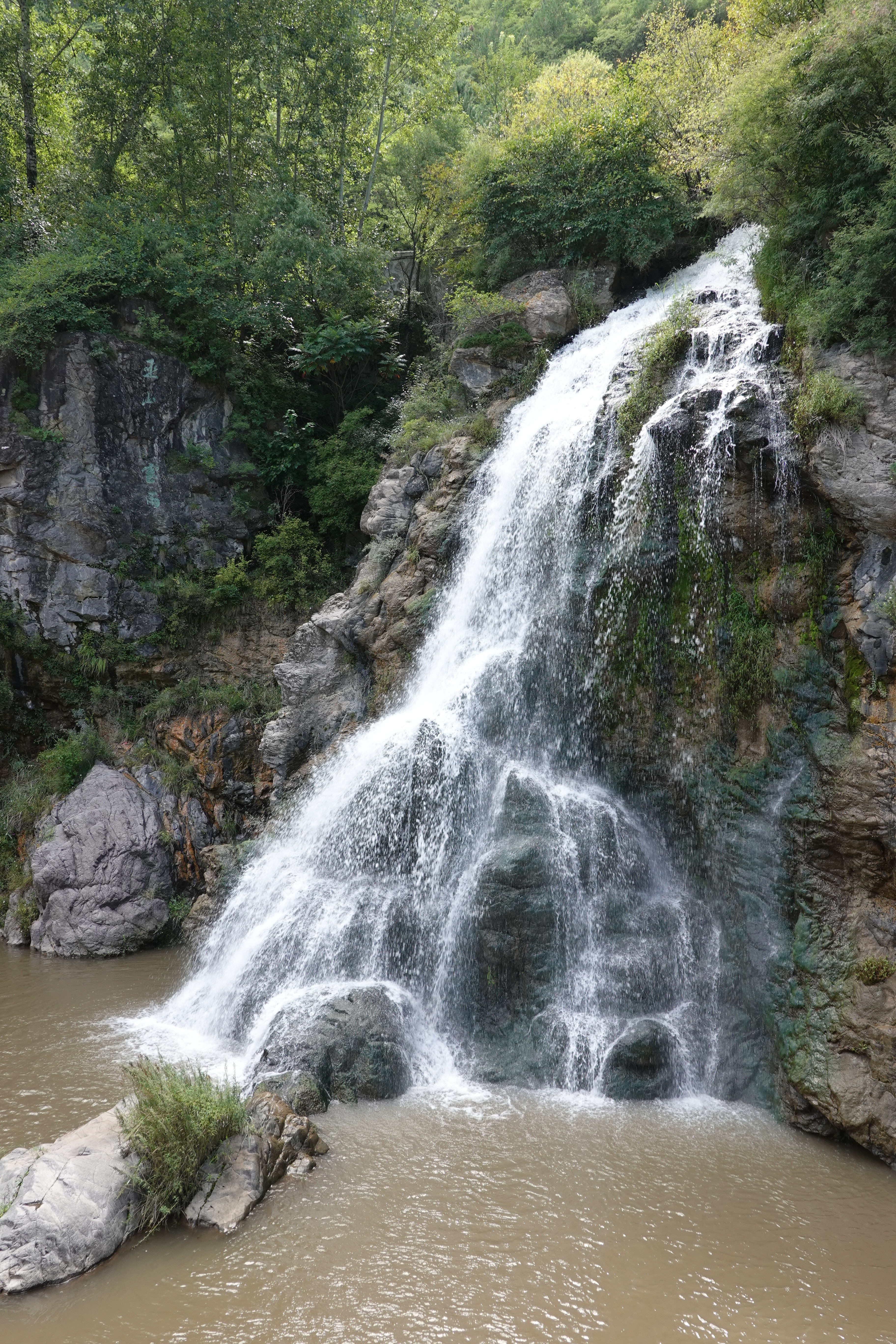 中文（中国大陆）: 乌龙峡谷一处瀑布